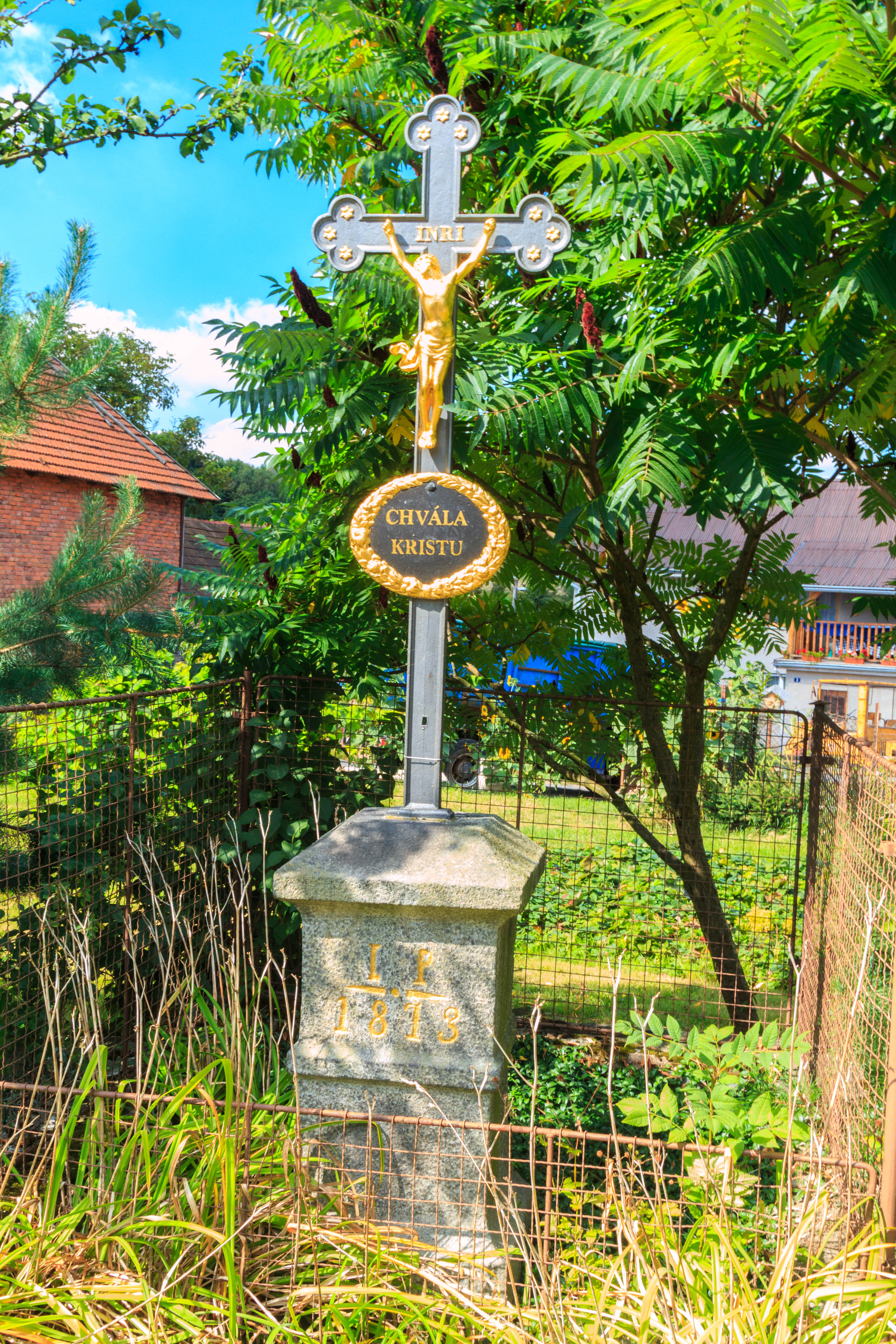 Oflenda - křížek